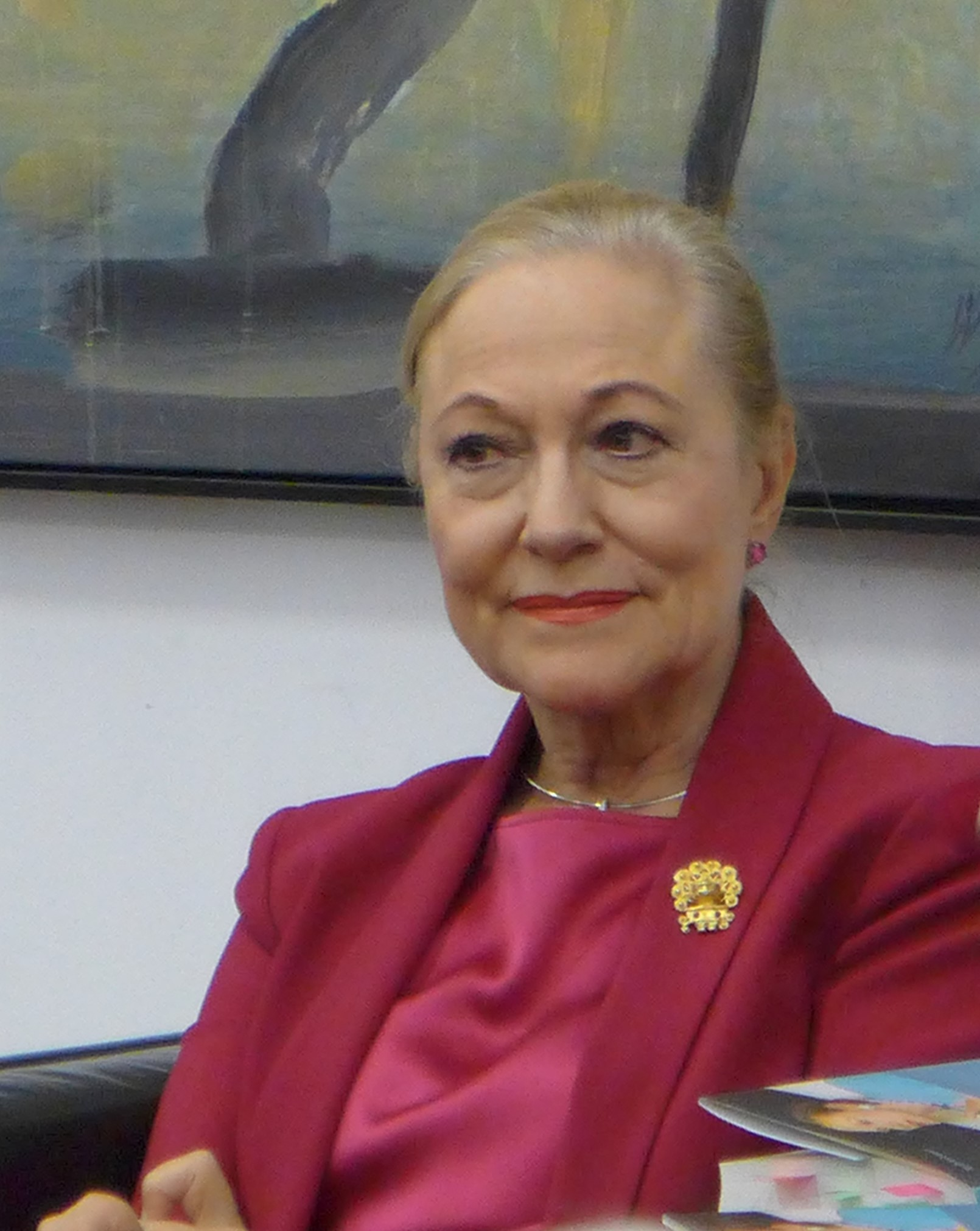 Benita Ferrero-Waldner (2017) bei der Vorstellung ihres Buches "Benita, Wo ein Wille, da ein Weg. Erfahrungen einer Europäerin und Kosmopolitin"